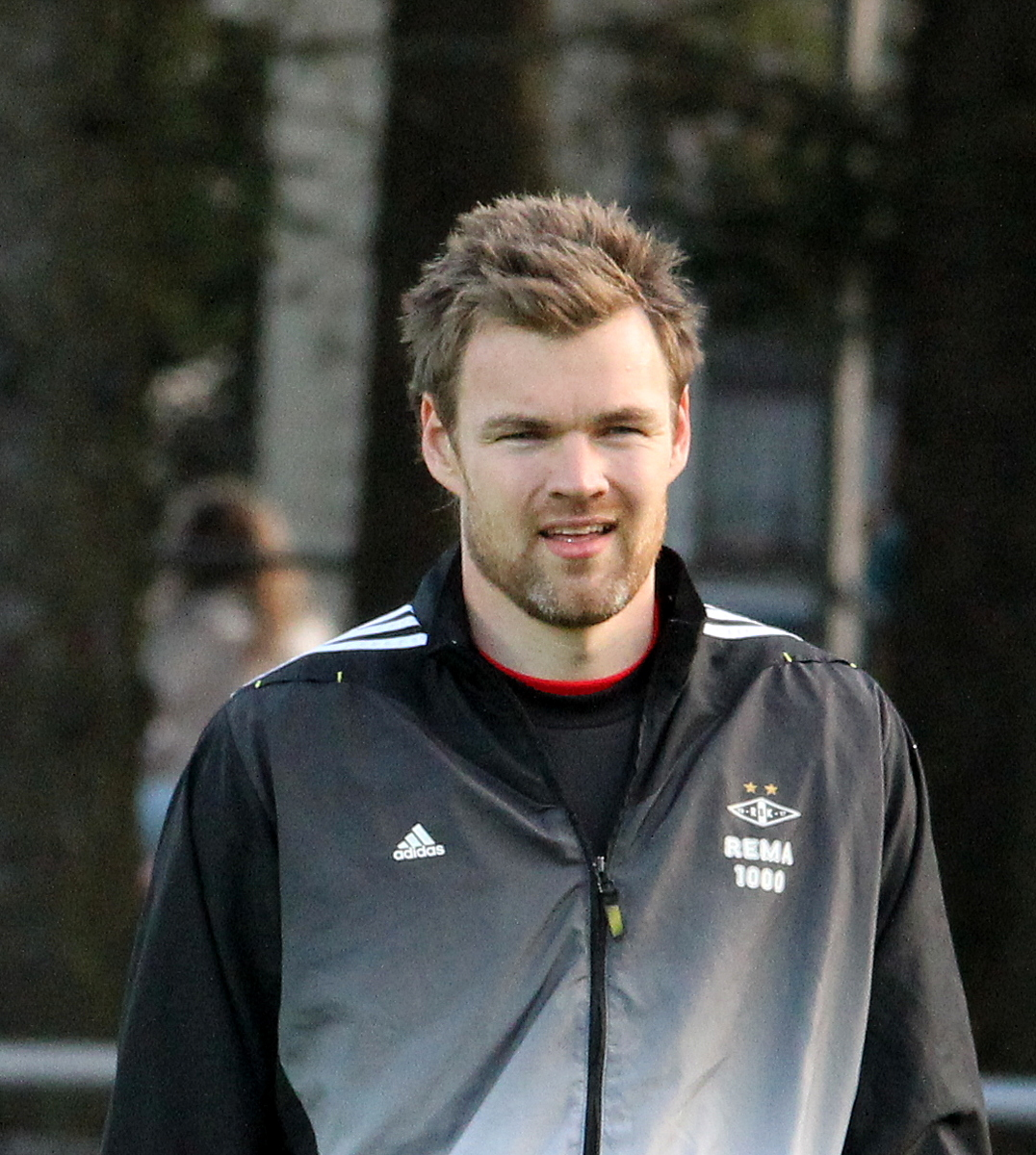 Alexander Lund Hansen